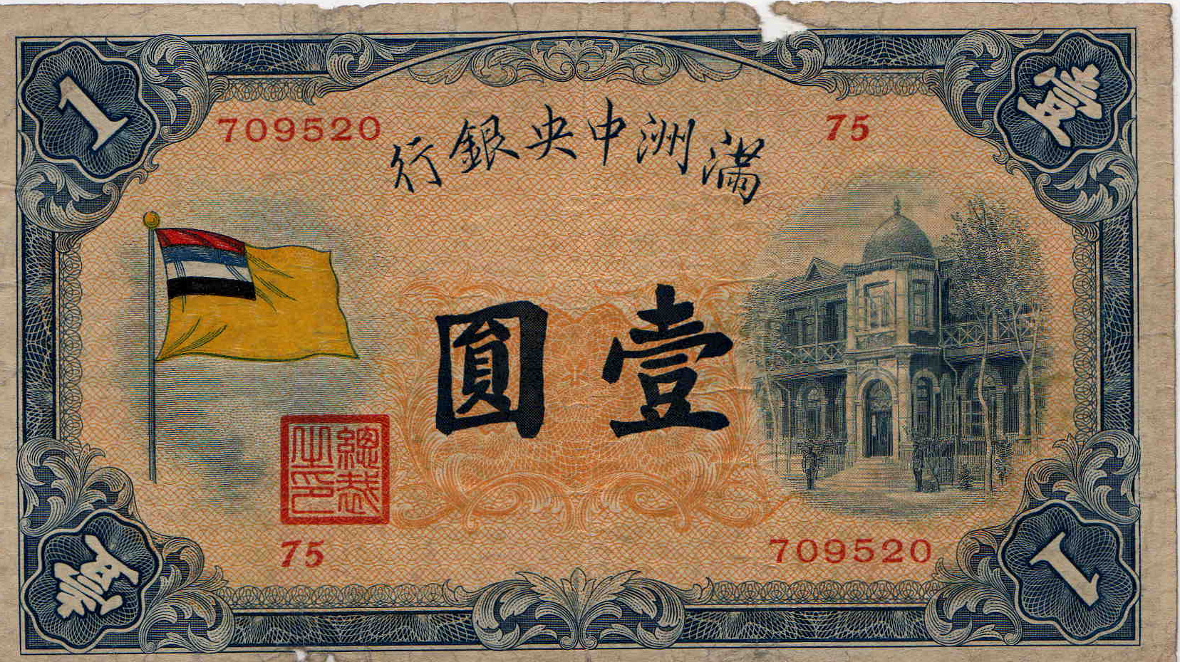 日本軍の後押しで開業した満州中央銀行が最初に発行した紙幣の一つ。